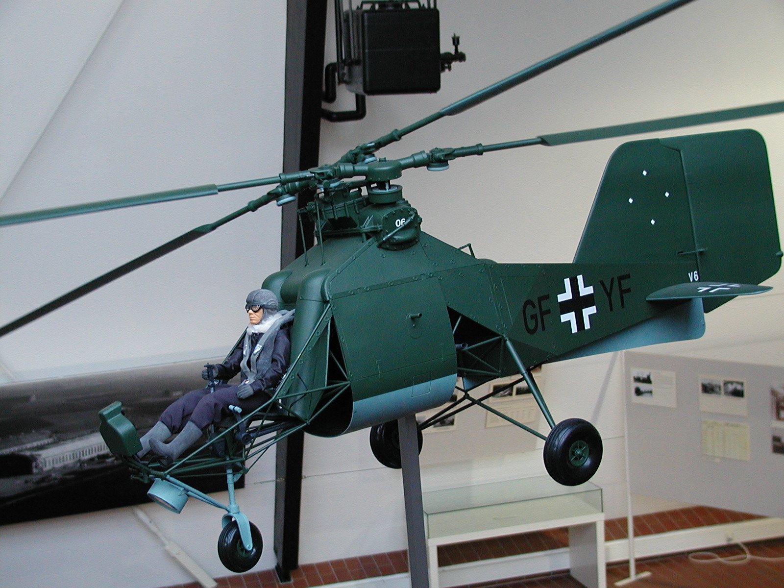 Seitenansicht des Flettner 282 "Kolibri"